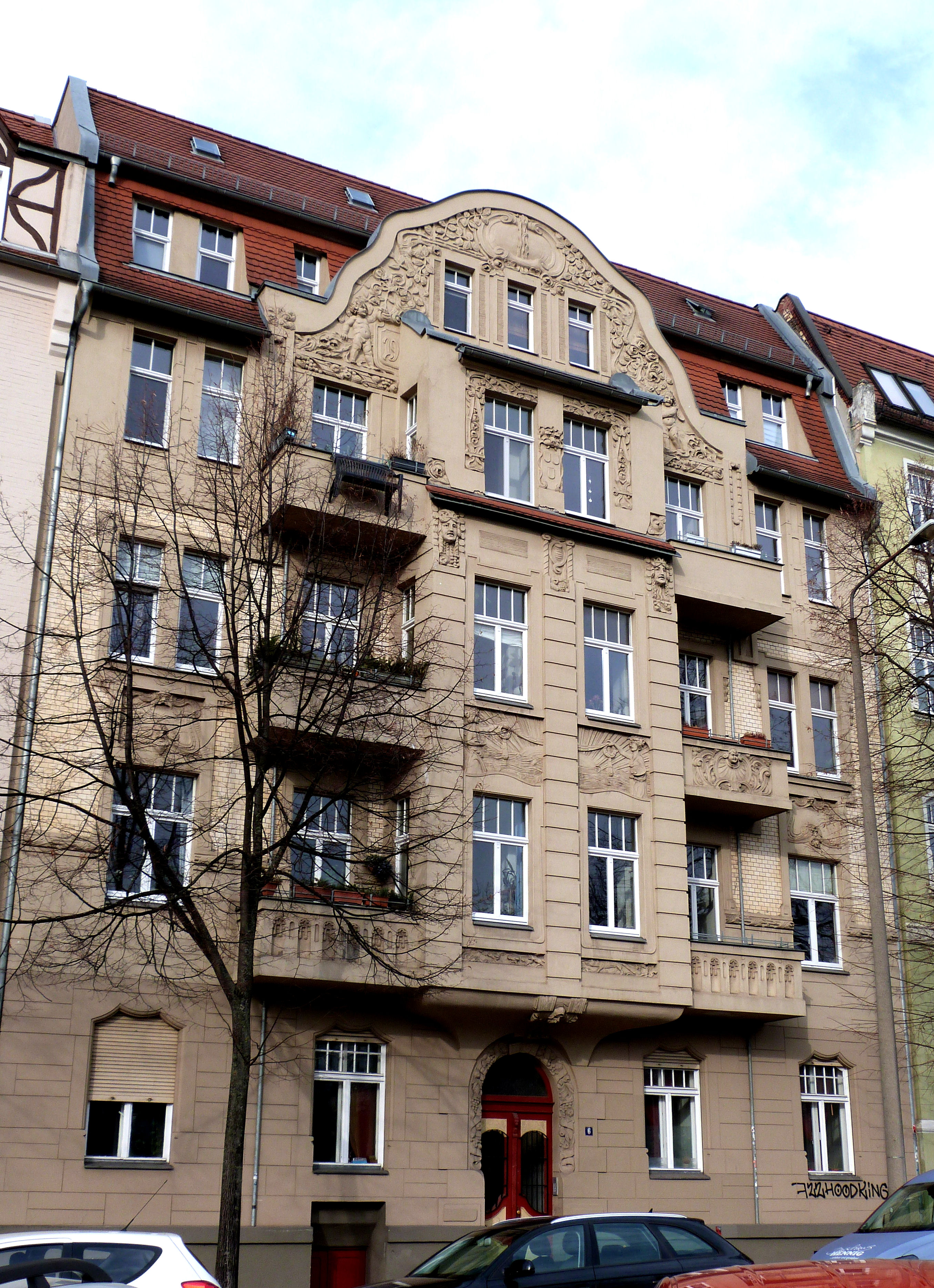 Paracelsusstraße 6, Halle (Saale)